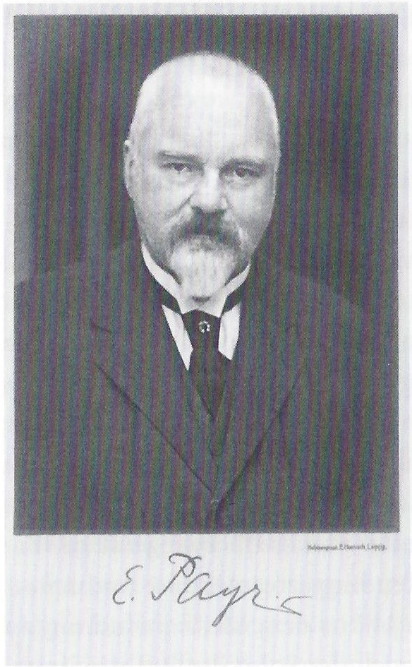 Haupthaus der alten Chirurgischen Universitätsklinik Leipzig